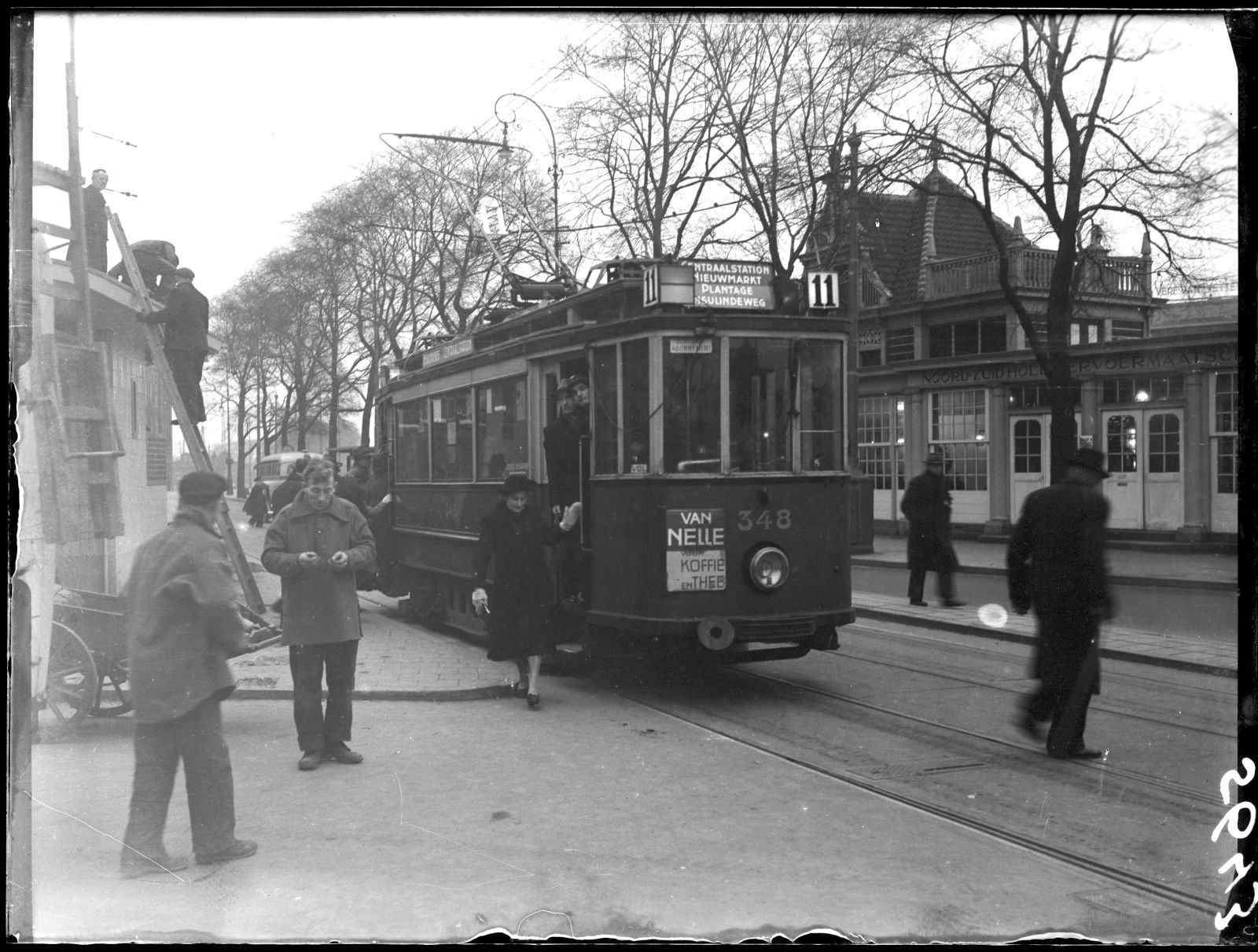 Tramlijn 11, Centraal Station - Nieuwmarkt - Plantage - Insulindeweg, Amsterdam, 20 december 1948 Foto Ben van Meerendonk / AHF, collectie IISG, Amsterdam